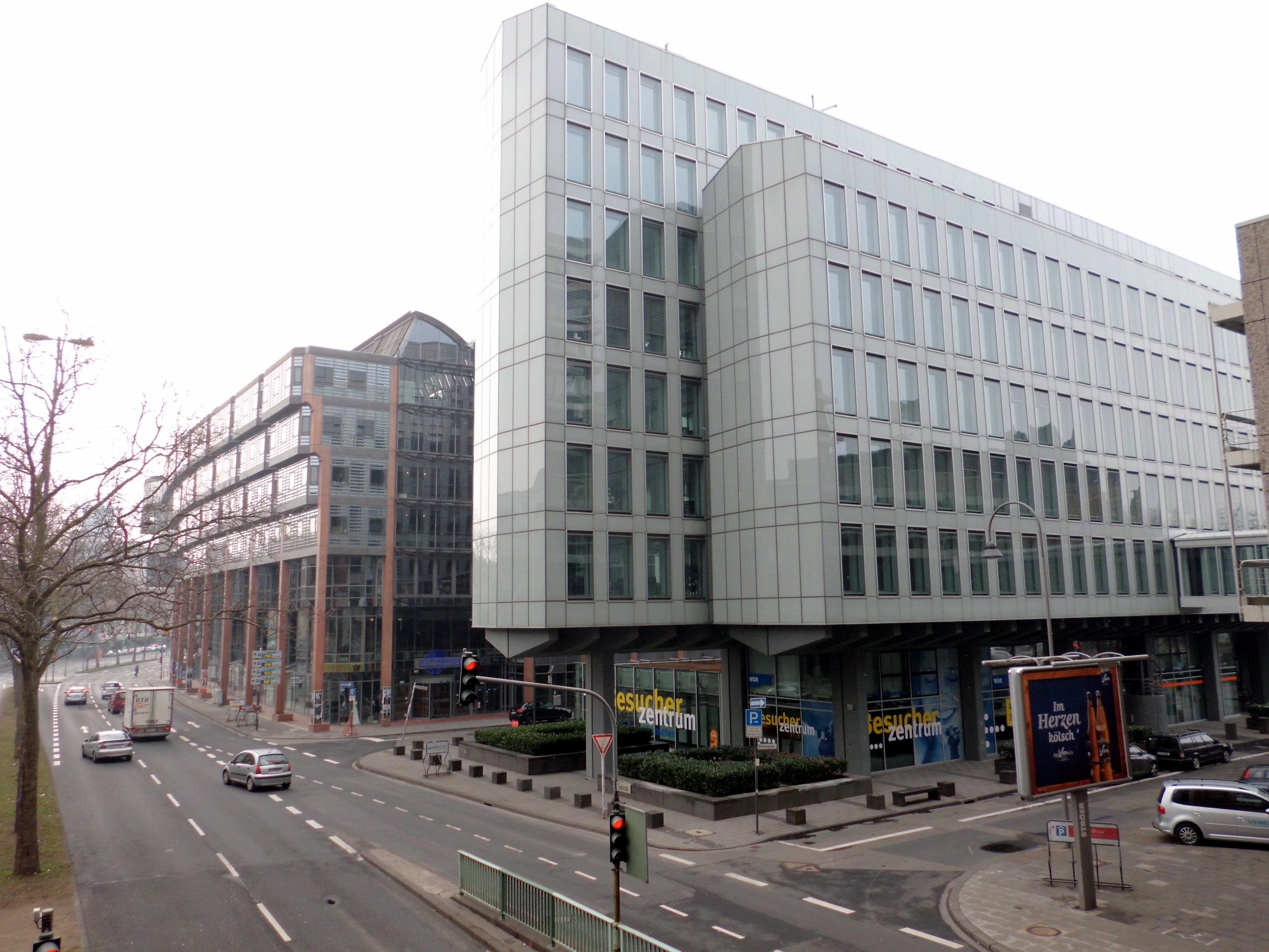 WDR-Besucherzentrum am Appellhofplatz im Erdgeschoss des Vierscheibenhauses, Hintergrund: WDR-Arkaden